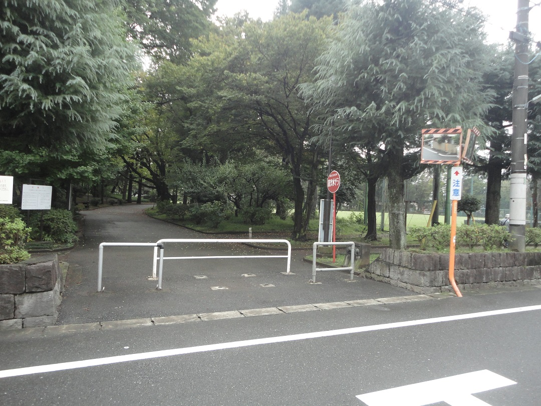 わかぐさ公園（東京都青梅市新町）